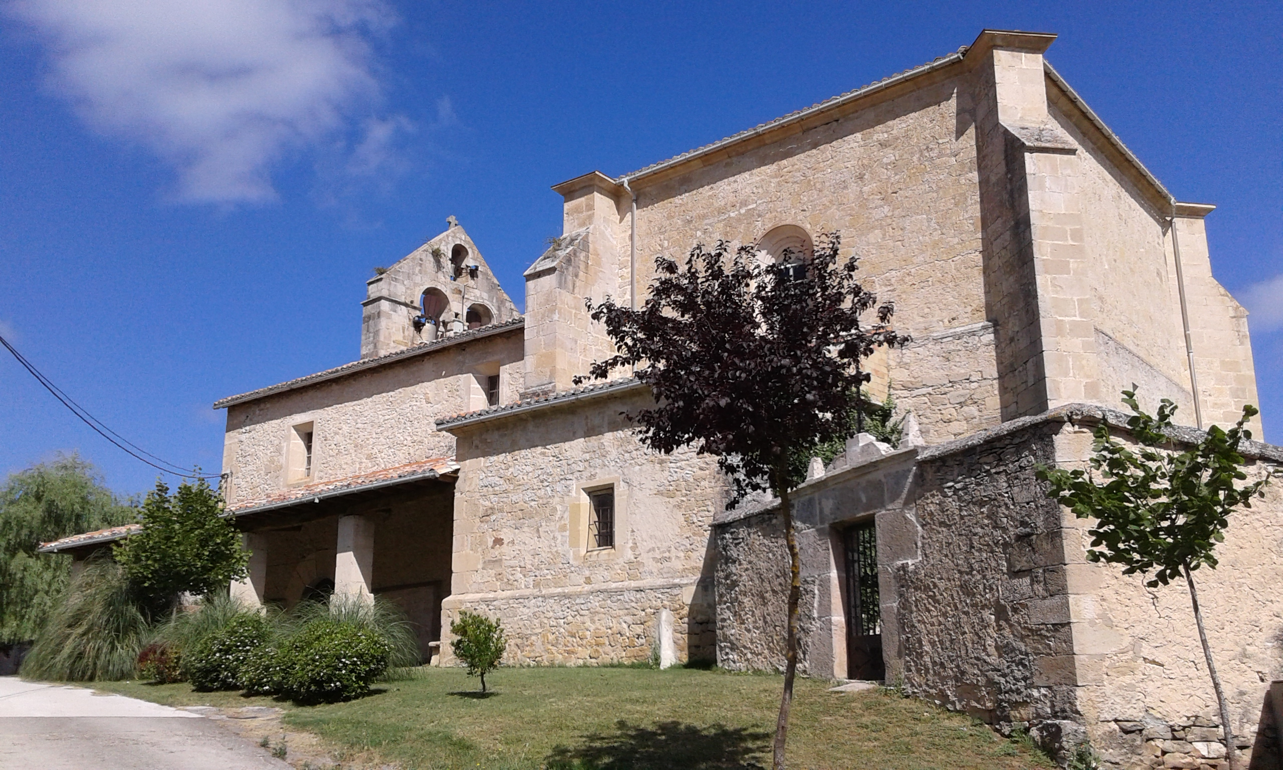 Iglesia parroquial de la loacalidad